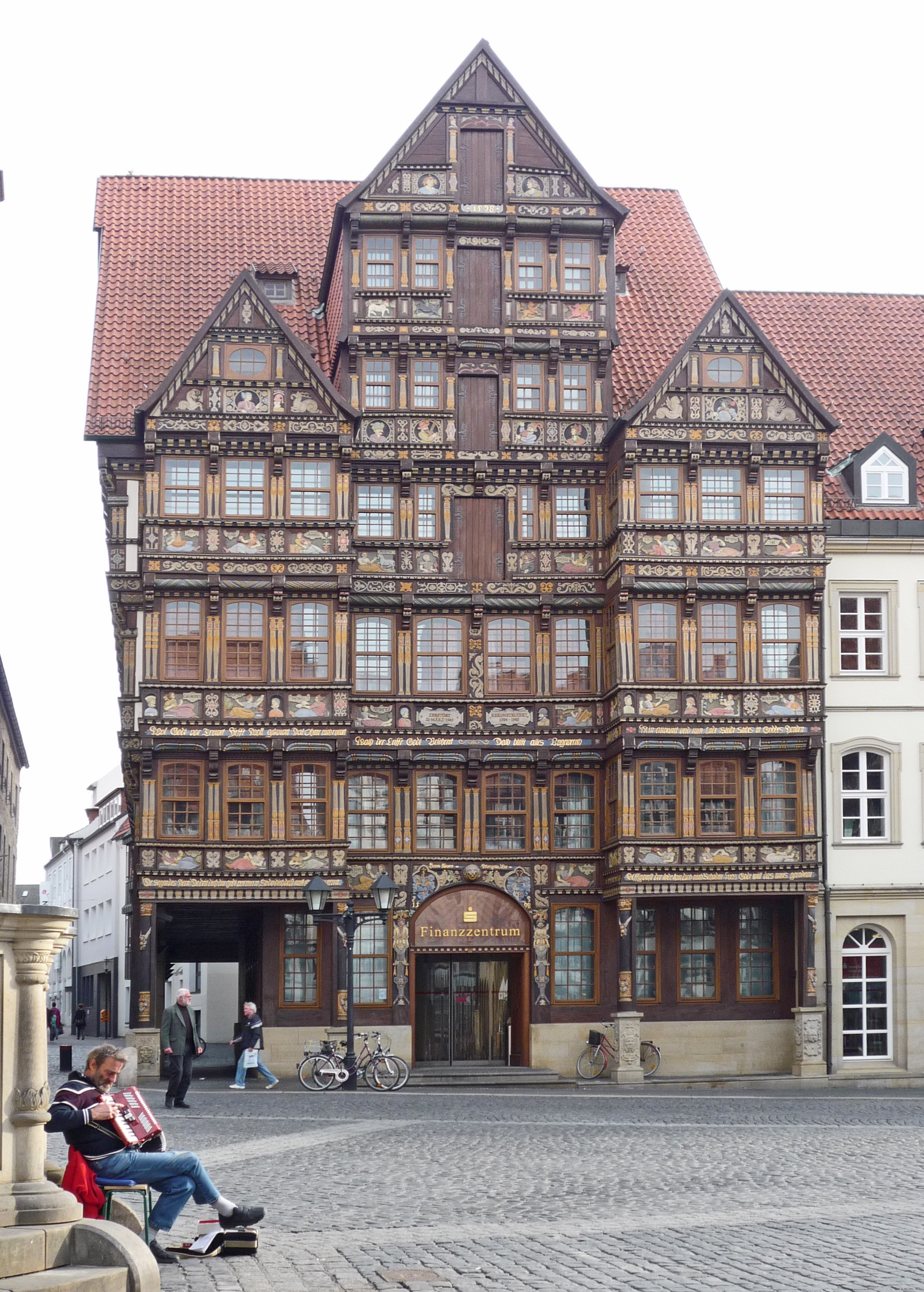 Wedekindhaus am Historischen Marktplatz in Hildesheim, Akkordeonspieler: Volker Hoffmann am Volkerbrunnen